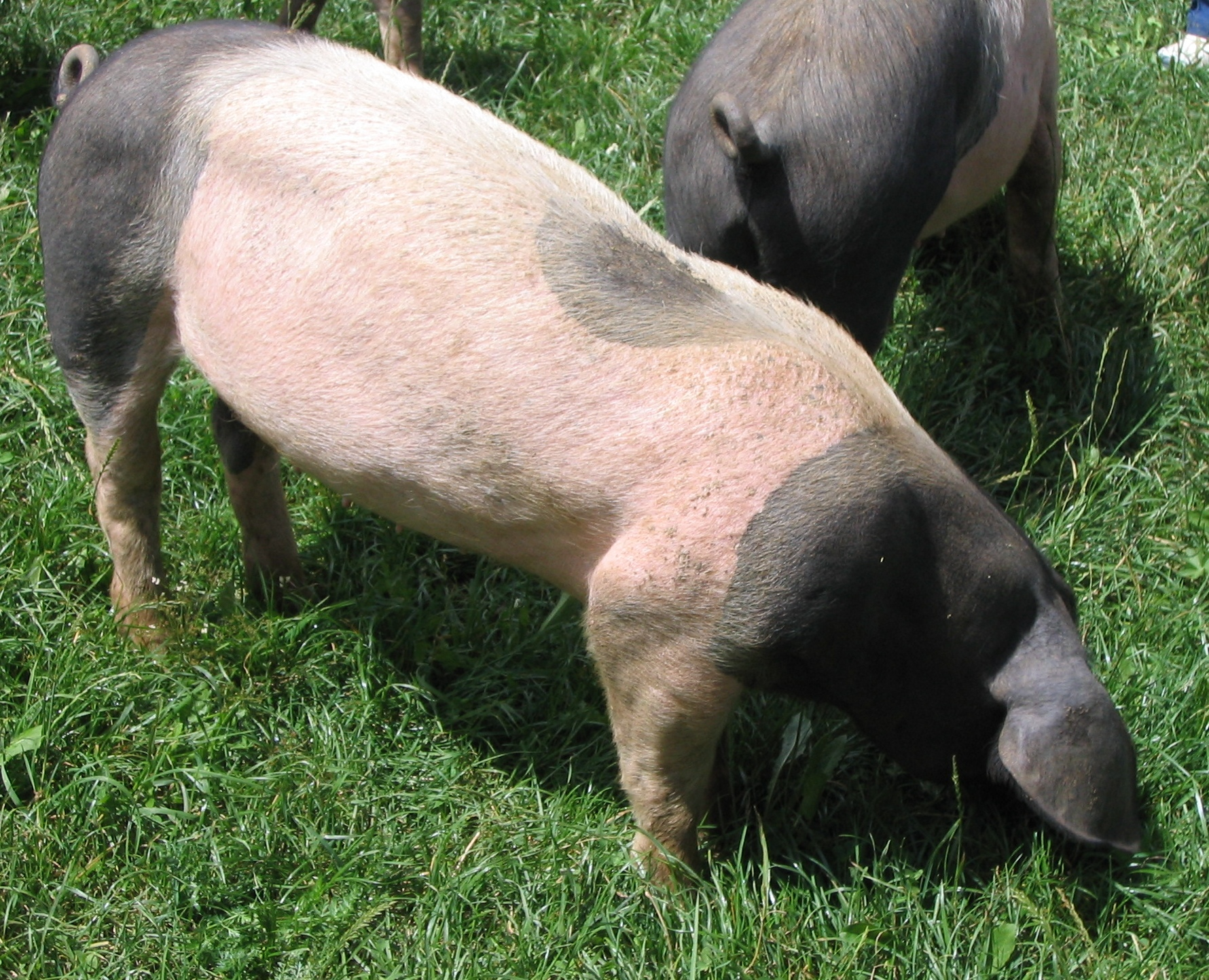 Schwäbisch-Hällisches Landschwein im Freilichtmuseum Neuhausen ob Eck